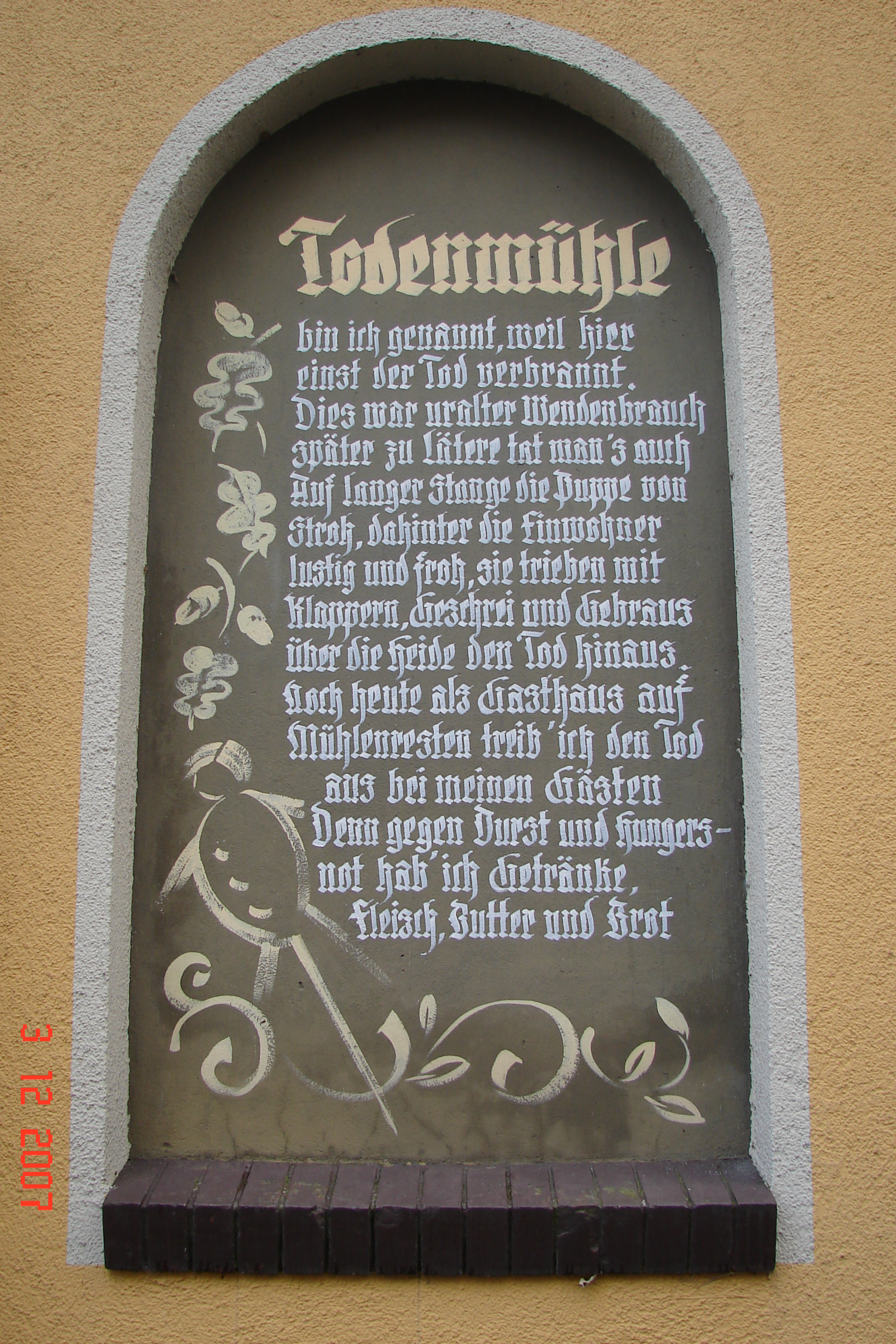 Gedicht über den alten Brauch des Todaustreibens, an der Fassade der Ullersdorfer Mühle, an der Dresdner Heide